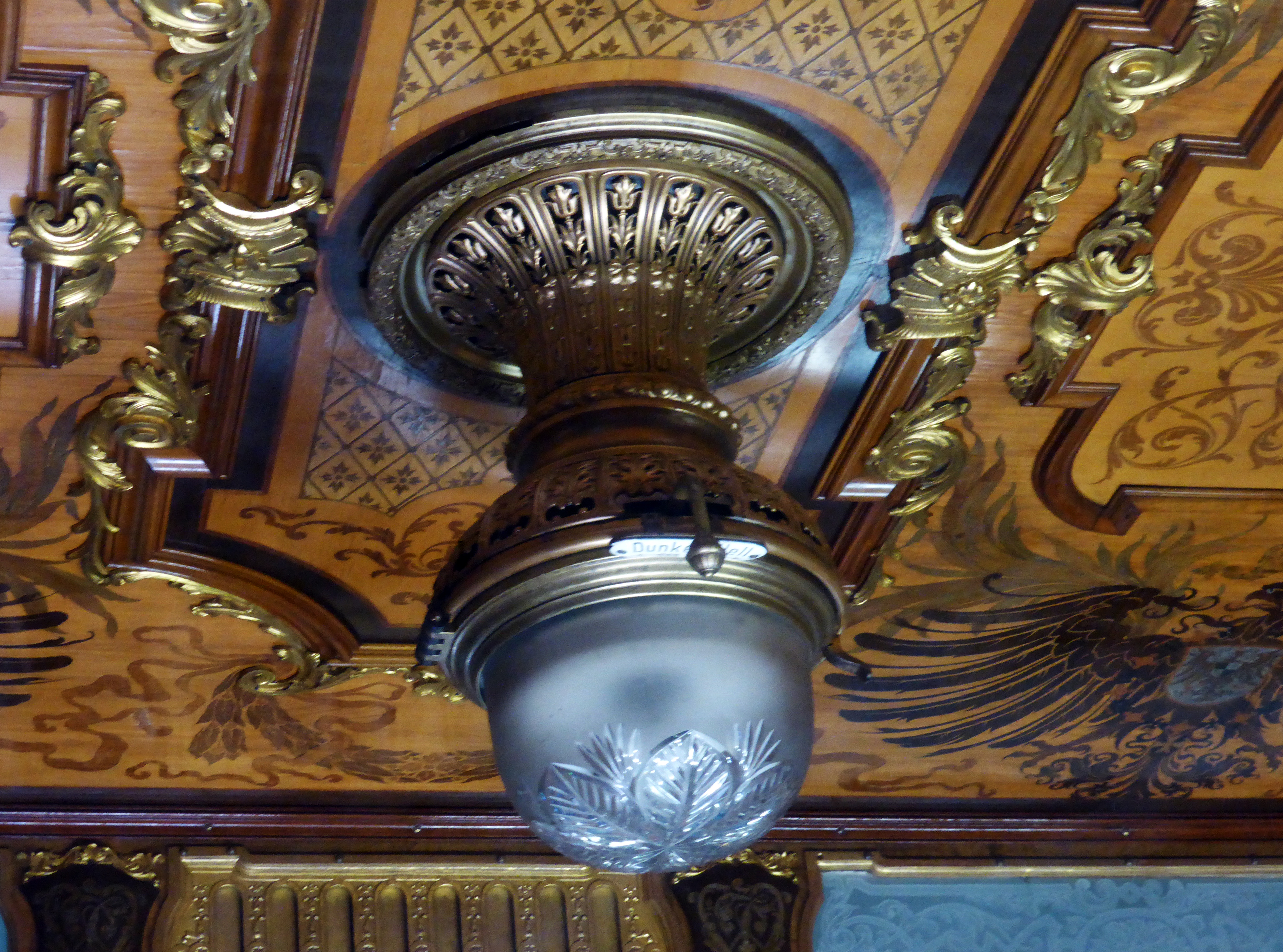 Hofzug Kaiser Wilhelms II. (Interieur), Baujahr 1888. Breslauer Aktiengesellschaft für Eisenbahnwagenbau. Interieur gestaltet durch Otto Lessing. Ausgestellt im Deutschen Technikmuseum in Berlin. Wikipedianische KulTour am 10. Oktober 2015 in der Ausstellung des Museums.